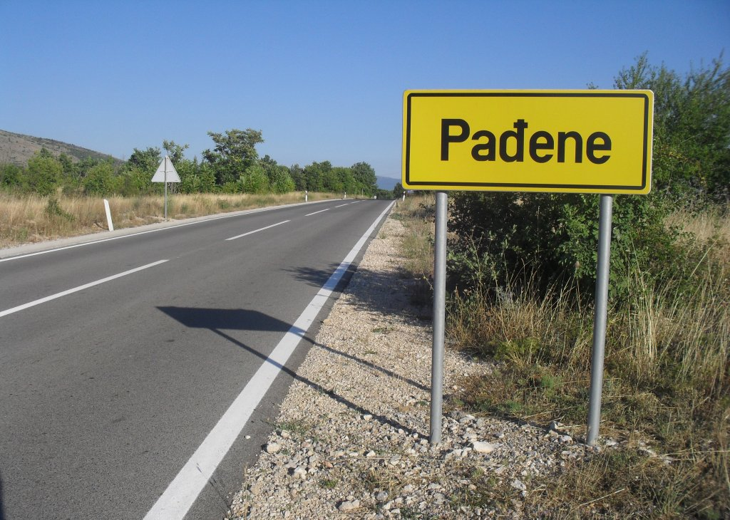 Улаз у Пађене из правца Лике, Далмација